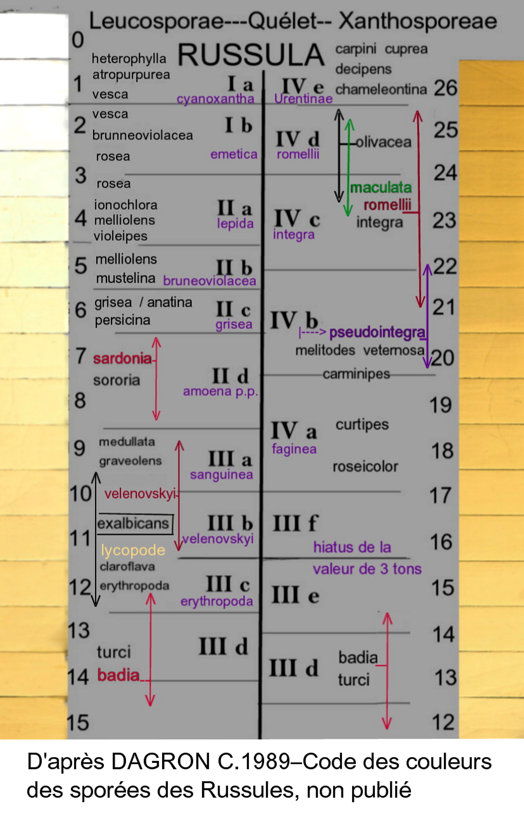 Échelle des couleurs de sporées de Russules en 26 nuances, fabriquée sur les instructions de Christian Dagron, Mycologue, spécialiste des Russules.